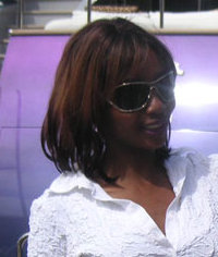 Odette Krempin